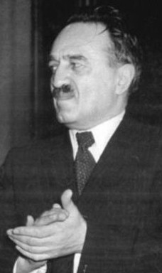 Title: Berlin, IV. SED-Parteitag Factual corrections and alternative descriptions are encouraged separately from the original description. Additionally errors can be reported at this page to inform the Bundesarchiv. Original historic description: Zentralbild-Heilig Zi-Ho. 6.4.1954 IV.Parteitag der Sozialistischen Einheitspartei Deutschlands, Berlin, Werner-Seelenbinder-Halle Am 6.4.1954 begrüsste eine Delegation der Pionier-Organisation "Ernst Thälmann" den Parteitag. UBz: Das Mitglied des Präsidiums des Zentralkomitees der KPdSU, A.I. Mikojan, mit einem Jungen Pionier. 6.4.954 Stammabzug darf nicht aus dem Hause"